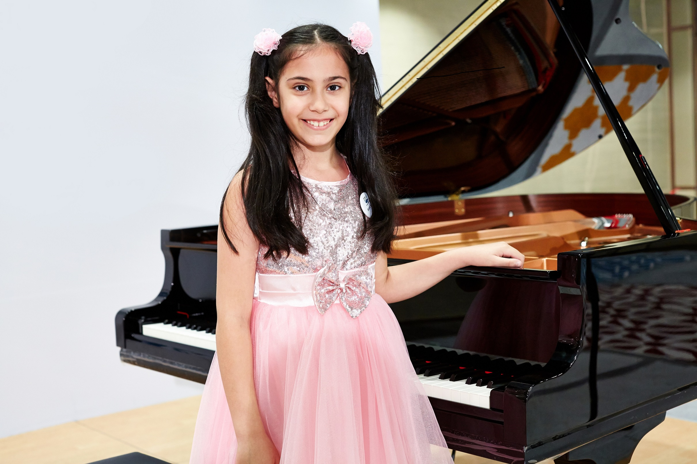 Arya Su Gülenç ve Piyano